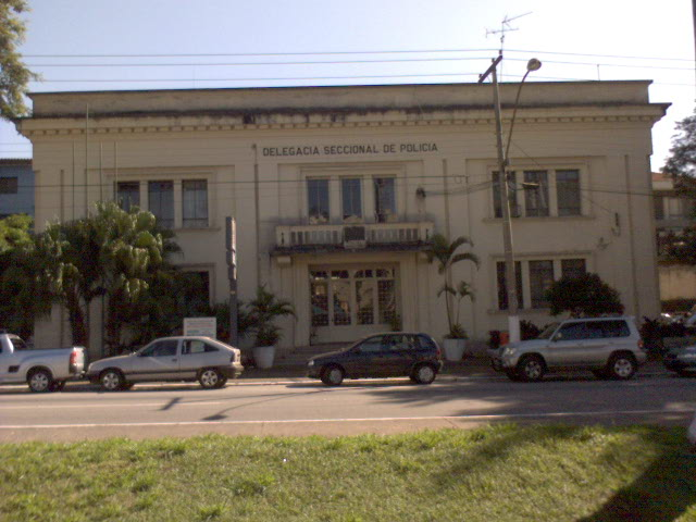 Delegacia de Polícia Seccional de Americana, São Paulo, Brasil